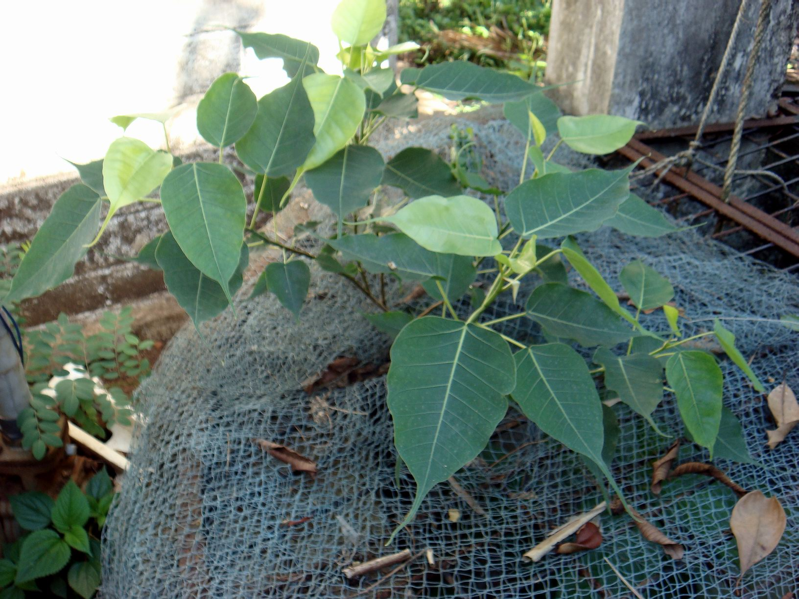 അതെവിടേയും വളരും. വെള്ളമൊന്നും ഒഴിക്കണ്ട. ഒരു കിണറിന്റെ പടികളില്‍ വളരുന്ന ആല്‍മരം